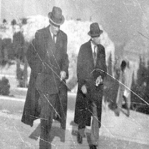 ריכרד ליכטהיים ולייב יפה 1938 (בתוך אלבום של משפחת ליכטהיים לדורותיה בראש האלבום עמוד עם כל פרטי המשפחה שלא צולם!)